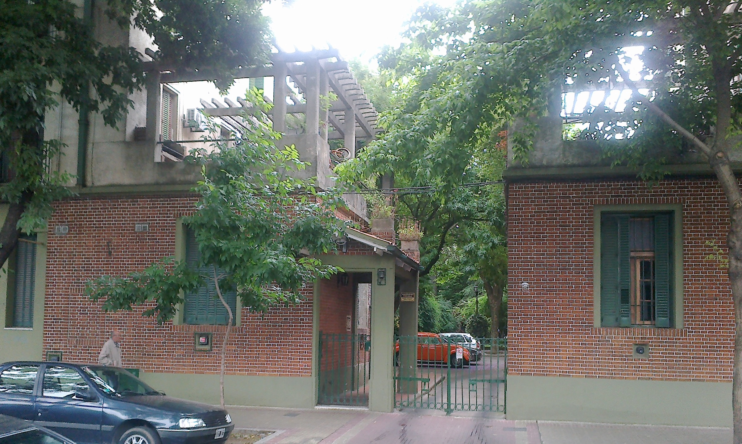 Barrio Parque los Andes, casas colectivas. Una de las entradas por Leiva. Buenos Aires, Argentina.